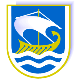 Grb občine Vrhnika